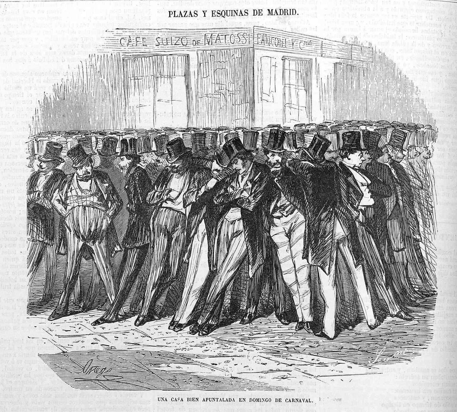 «Plazas y esquinas de Madrid», en la revista española El Museo Universal.